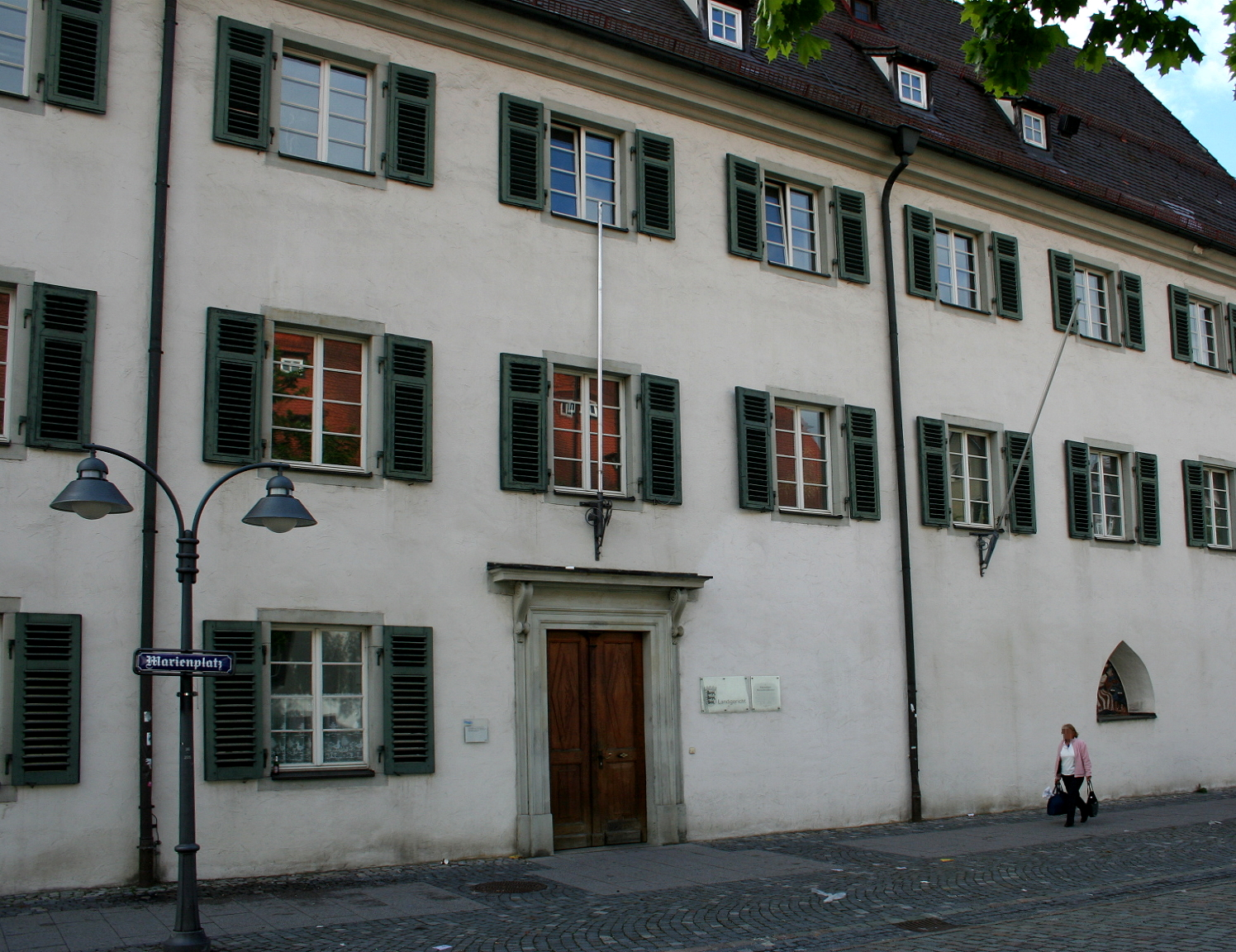 Ravensburg, ehemaliges Karmeliterkloster, heute Landgericht Ravensburg; Fassade zum Marienplatz